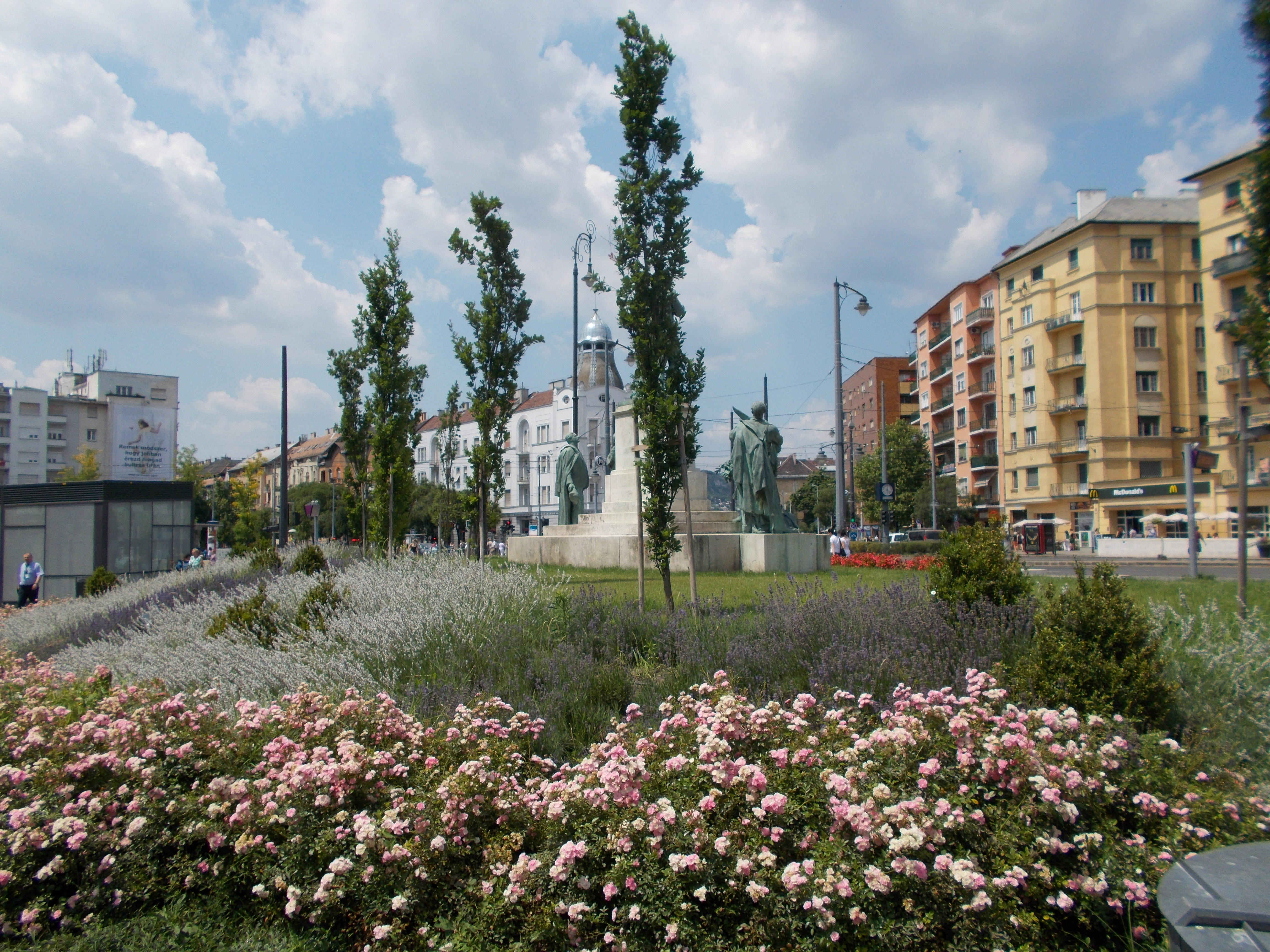 Móricz Zsigmond körtér. Kis kert a Szent Imre herceg szoboregyüttessel (hátoldal). Mögötte a Móricz Zsigmond körtér műemlék épület együttesének Villányi út és Bartók Béla út sarok részlete. ID 8242- Magyarország, Budapest, XI. kerület, Móricz Zsigmond körtér kb. 1-5 (Észak-északnyugati oldal) This is a photo of a monument in Hungary. Identifier: 8242